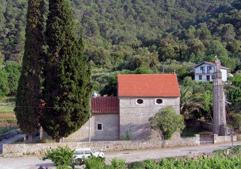 Crkva sv. Marije u Dolu na Hvaru